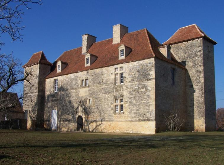 Château de Lantis Dégagnac Lot (46) France (retrouvez nous sur